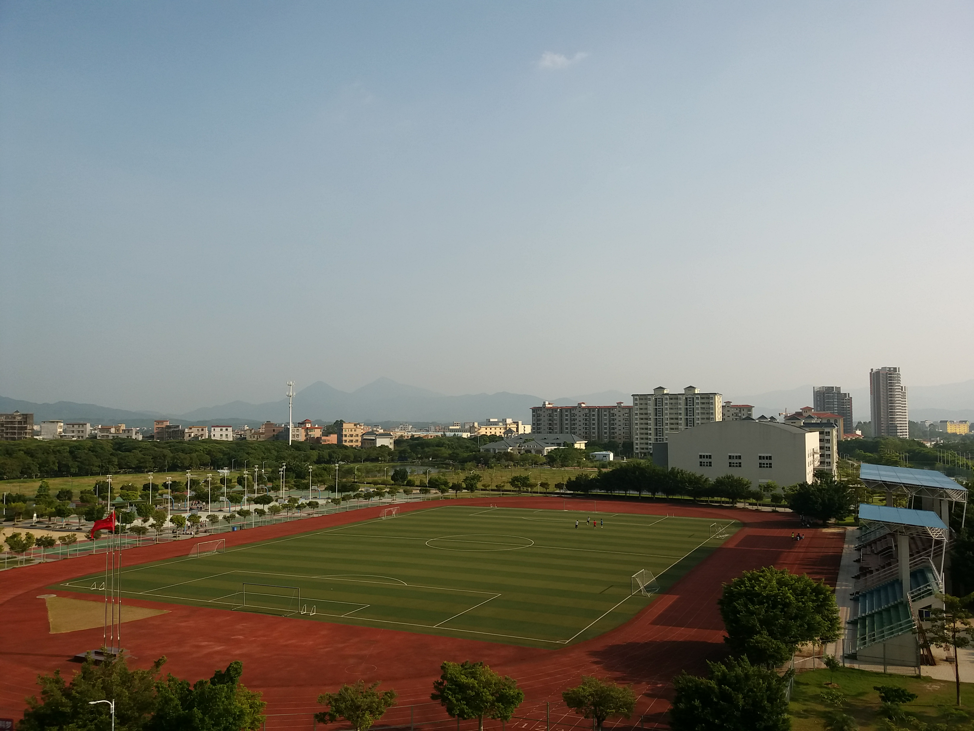 中文（中国大陆）: 田径场全景